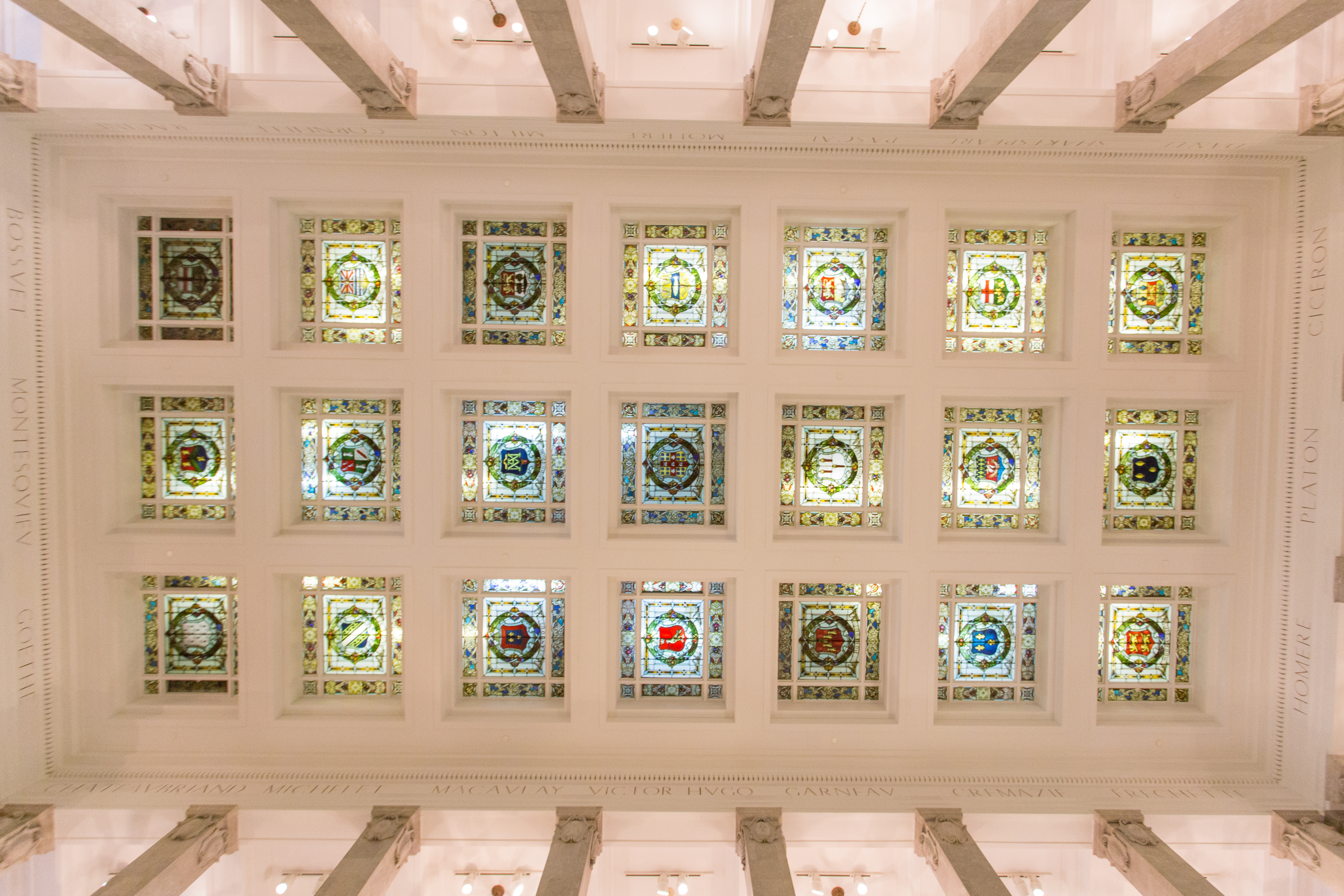 Intérieur de l'ancienne Bibliothèque municipale de la ville de Montréal, aussi connue sous le nom de la Centrale et aujourd'hui l'Édifice Gaston-Miron. Détails du plafond.